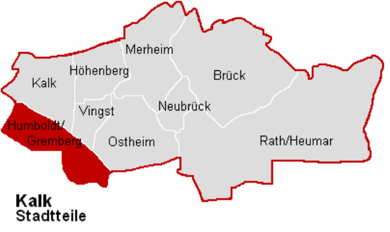 Lage des Stadtteils Humbold/Gremberg im Stadtbezirk Köln-Kalk